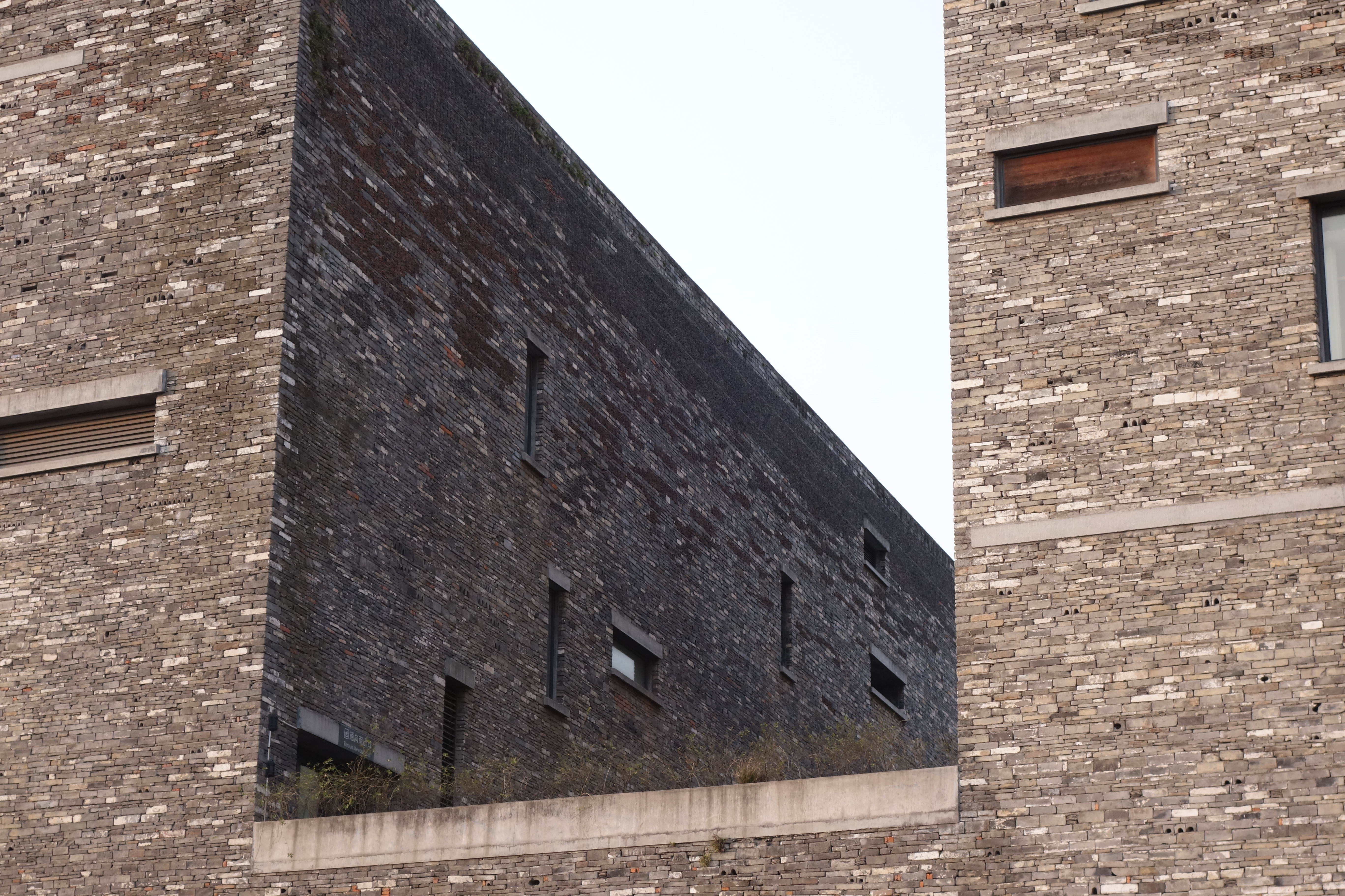 宁波博物馆二、三层南侧分离处